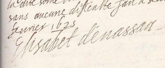 description : Signature de Elisabeth de Nassau (1625)Signature of Elisabeth of Nassau.